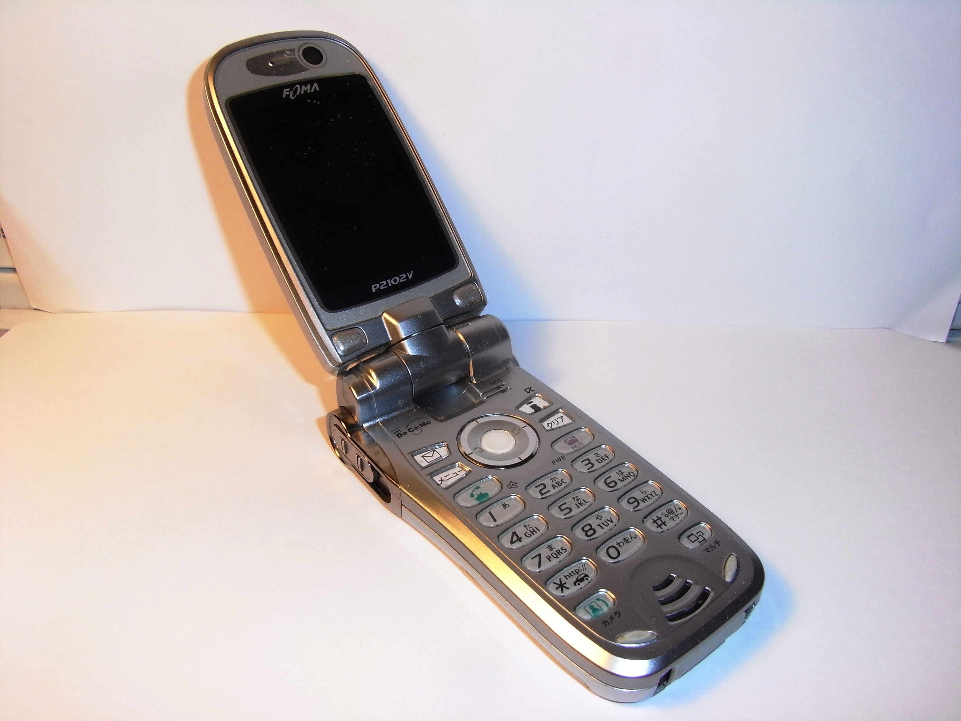 NTT docomo P2102V(P2102V